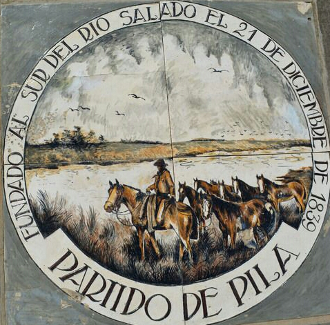 Escudo del Partido de Pila (no he podido encontrar otra imagen similar a esta)